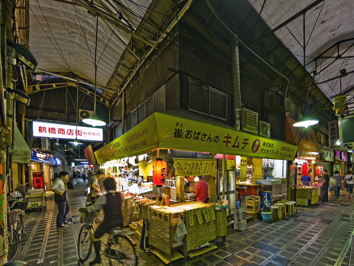 キムチの店（大阪市東成区東小橋3-15-1、鶴橋駅最寄り、鶴橋商店街にある「チェ おばさんのキムチ 崔」[1]